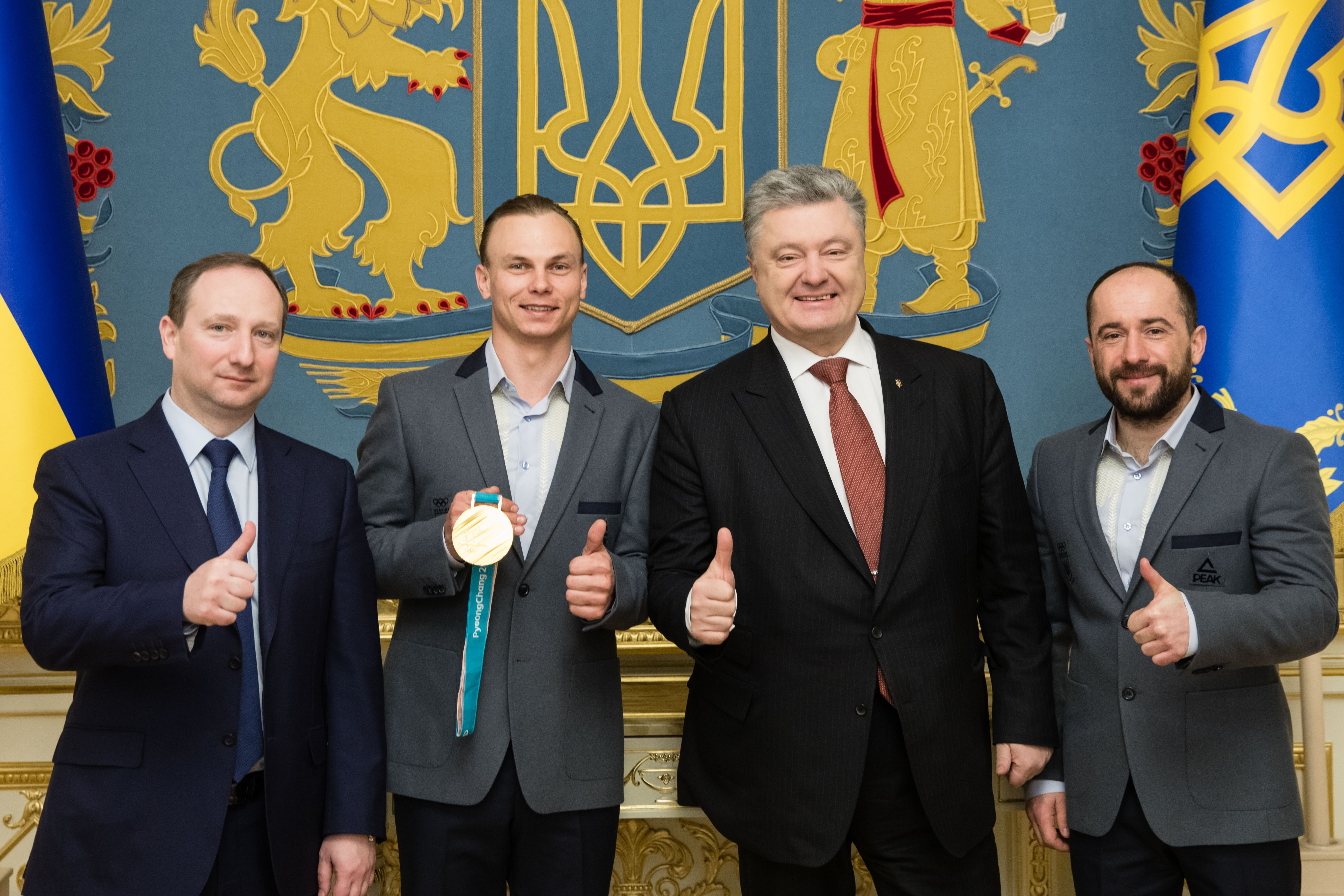 Президент Петро Порошенко вручив чемпіону XXIII зимових Олімпійських ігор Олександру Абраменку орден «За заслуги», 28 лютого 2018 року